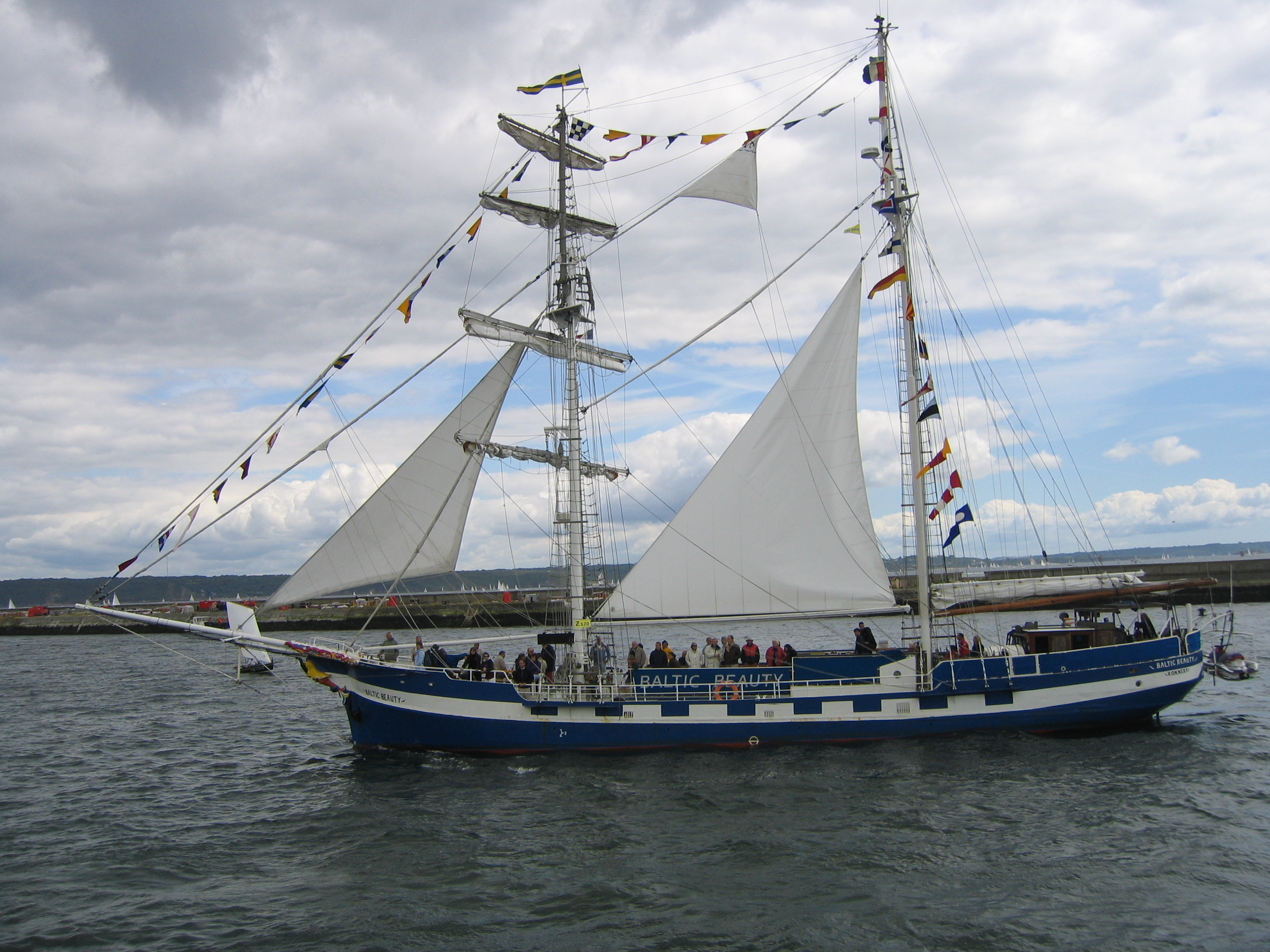 Lors de Brest 2008